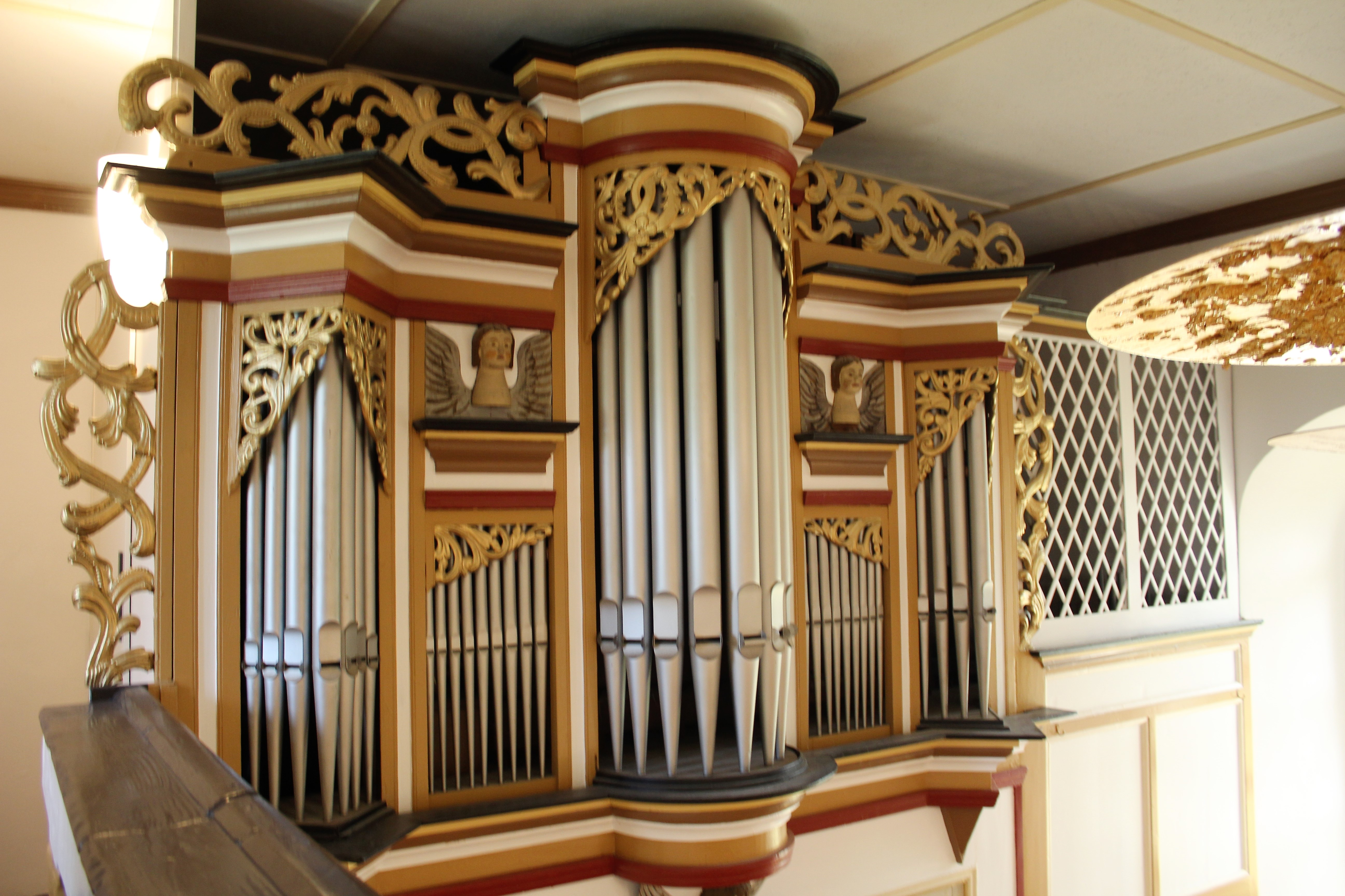 Evangelische Kirche Oberwetz, Gemeinde Schöffengrund, Hessen, Deutschland